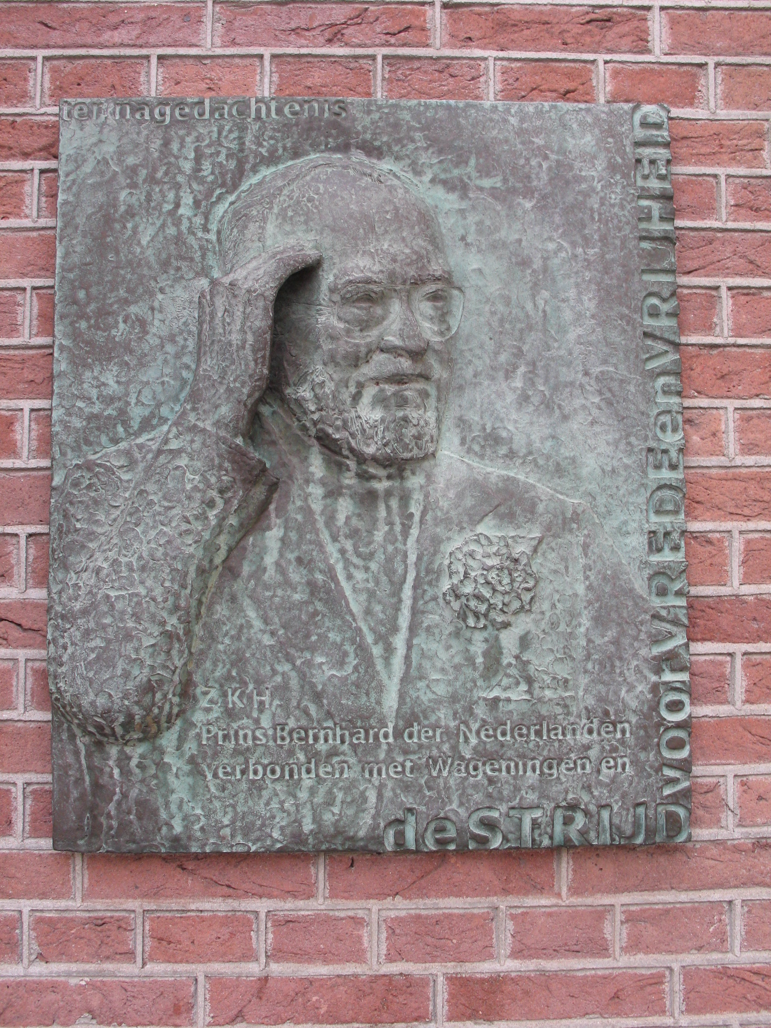 Plakaat aan het 5 Meiplein